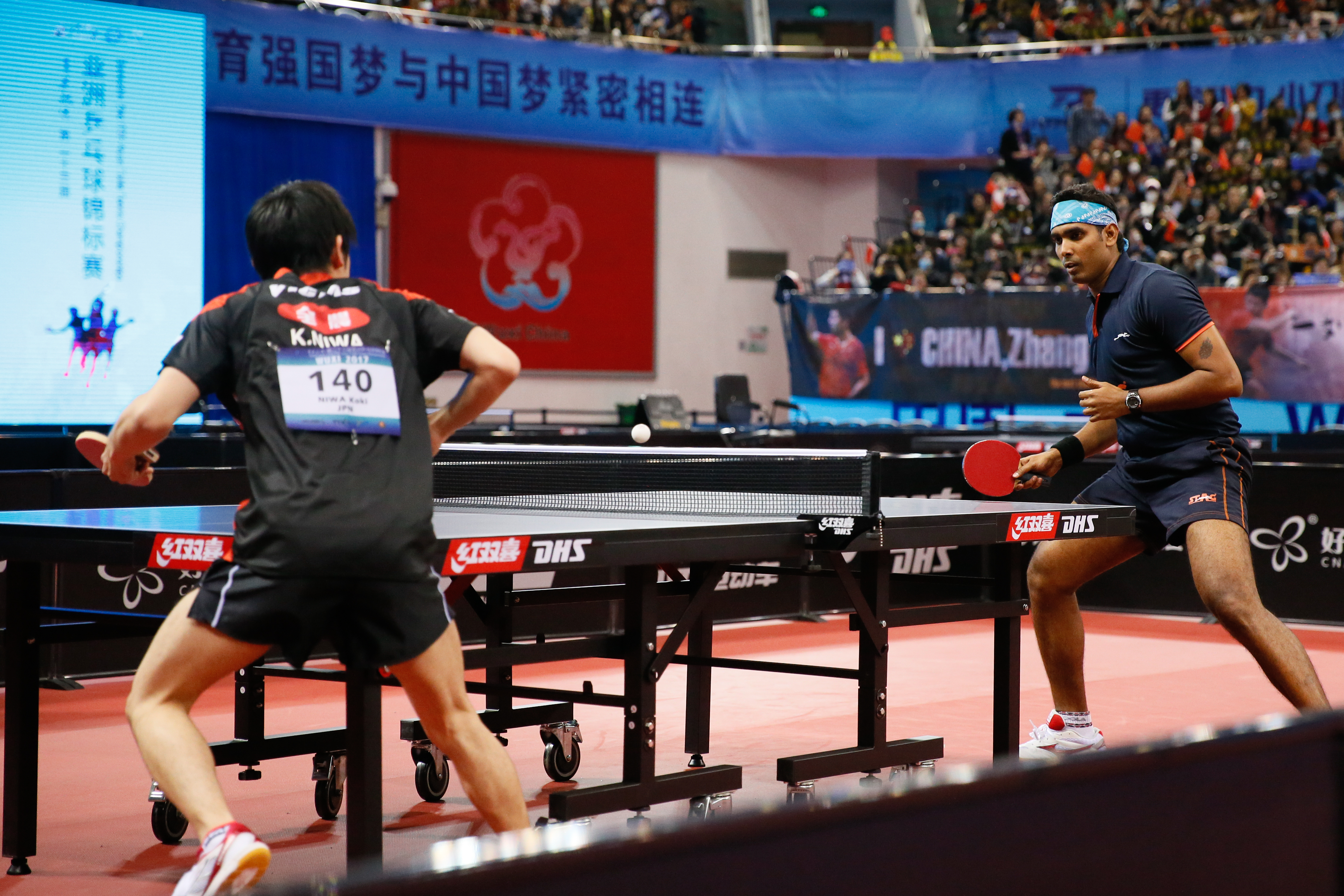 _K0K2183